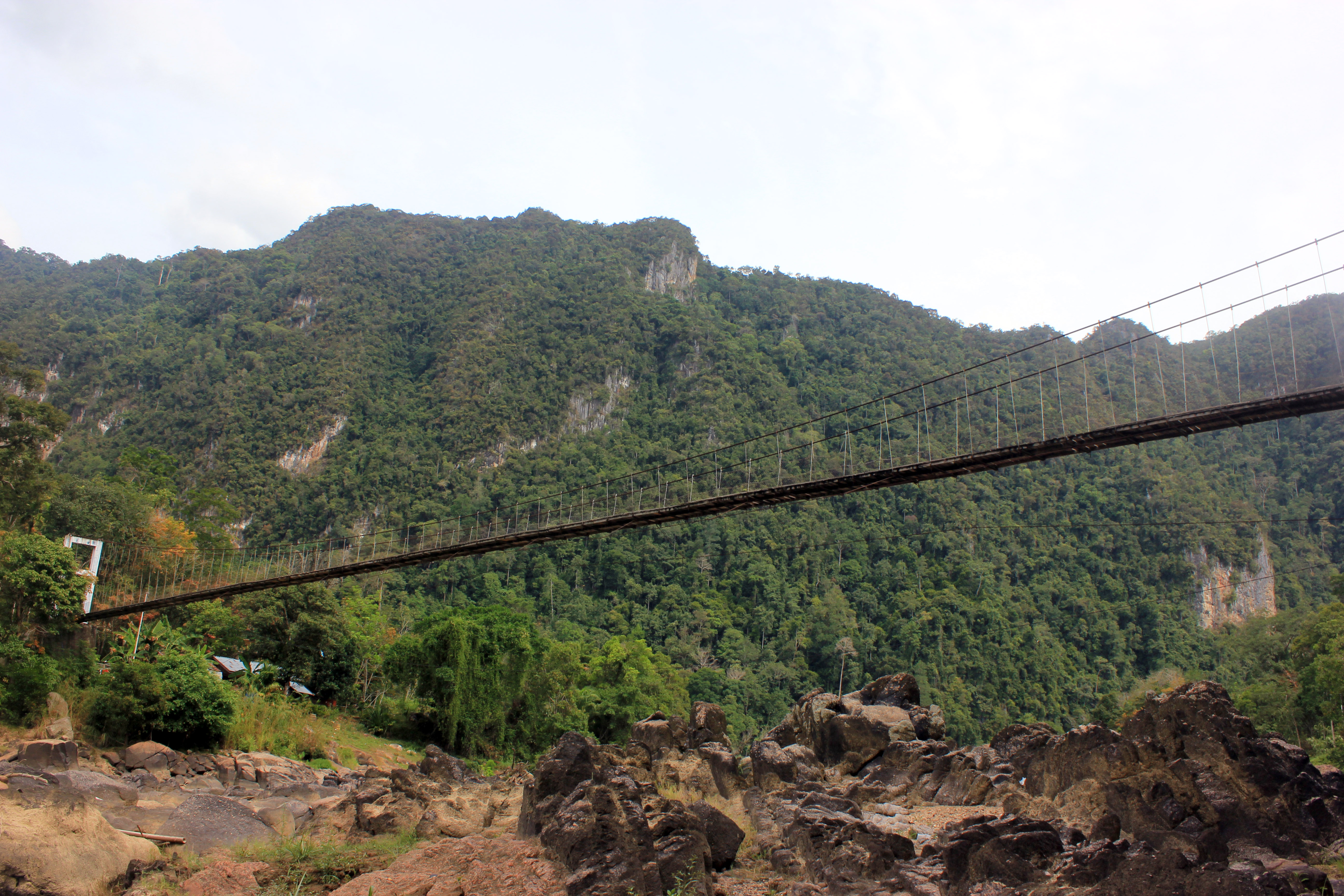 Jembatan Gantung yang terletak di Nagari Silokek, Kabupaten Sijunjung